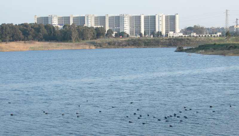 cillarese